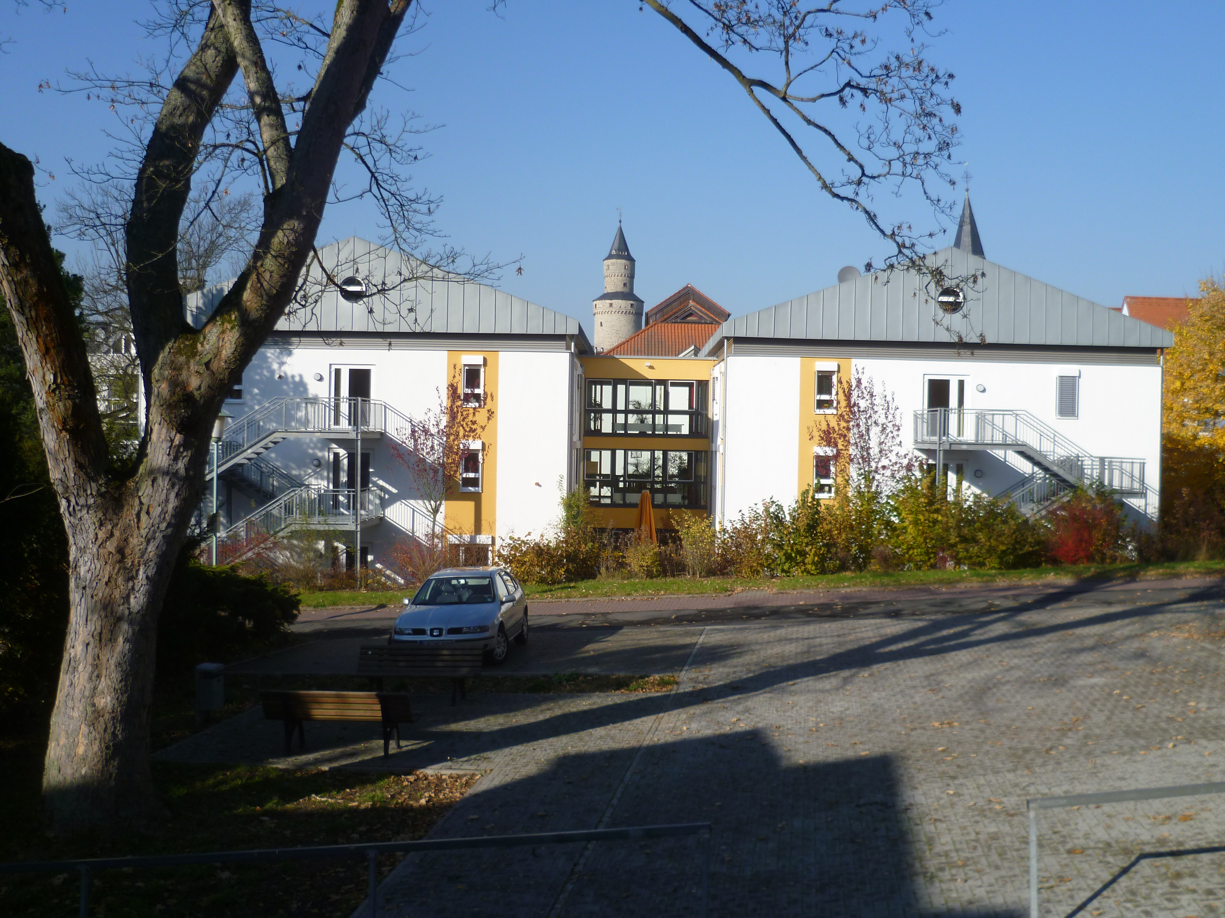 Das Rudolf-Ehlers-Haus am Kalmenhof